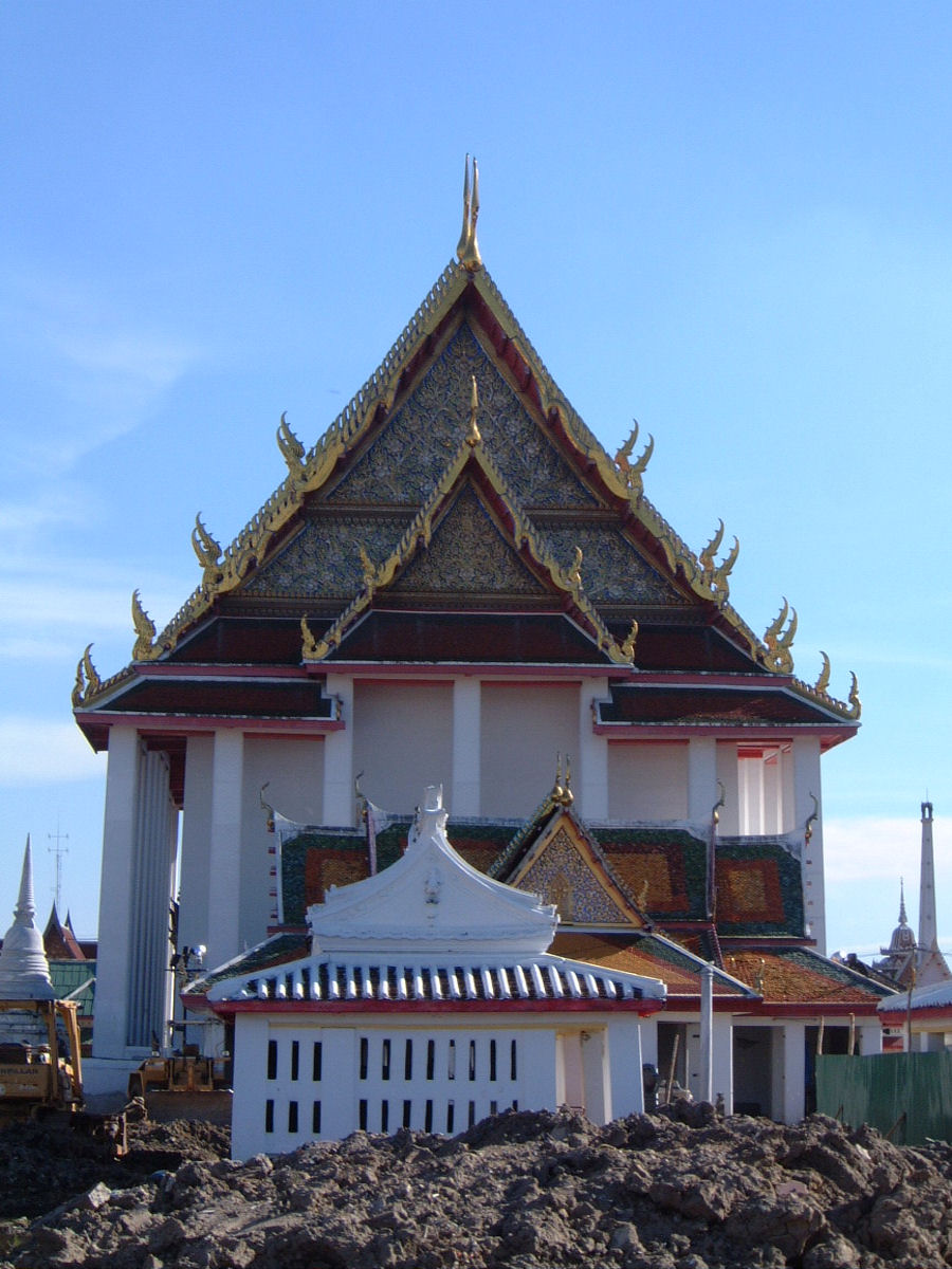 Wat Kanlayanimitr (วัดกัลยาณมิตรวรมหาวิหาร), Bangkok, Thailand